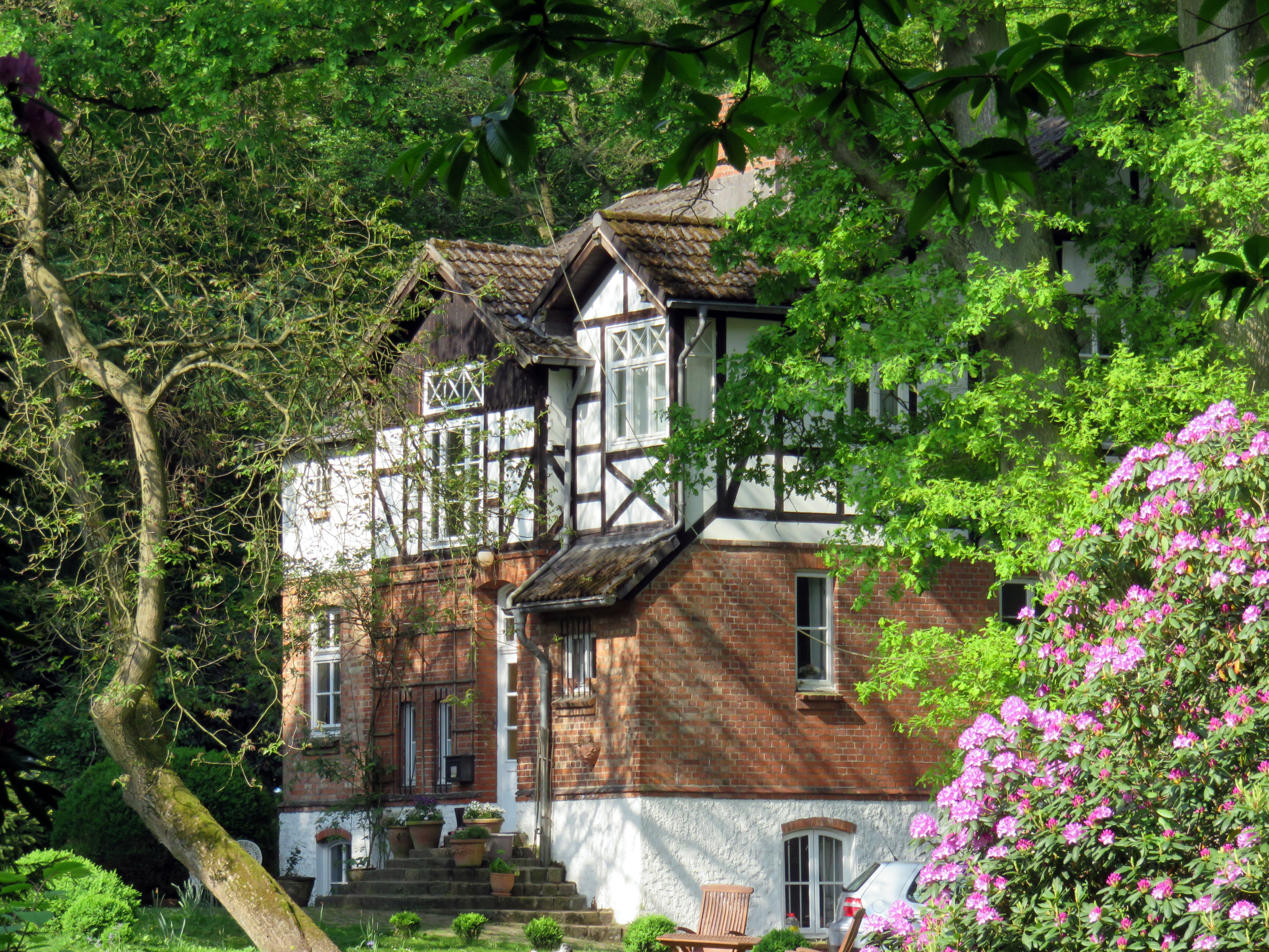 Ehemaliges “Landhaus Illies”, Grüner Winkel 9, Hamburg-Ohlsdorf, in welchem Mutter und Bruder des deutschen Malers und Grafikers Arthur Illies und vorübergehend (1901) auch er selbst lebten. Bis 1916 diente es den Mitgliedern der Hamburger "Vereinigung für Kunstpflege e. V.” als “Klubhaus” für Freizeit- und Sportveranstaltungen. This is a photograph of an architectural monument.